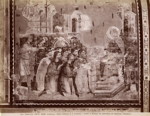 La coppa ritrovata nel sacco di beniamino